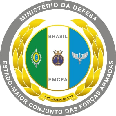 Logo do Estado Maior Conjunto das Forças Armadas Brasileiras